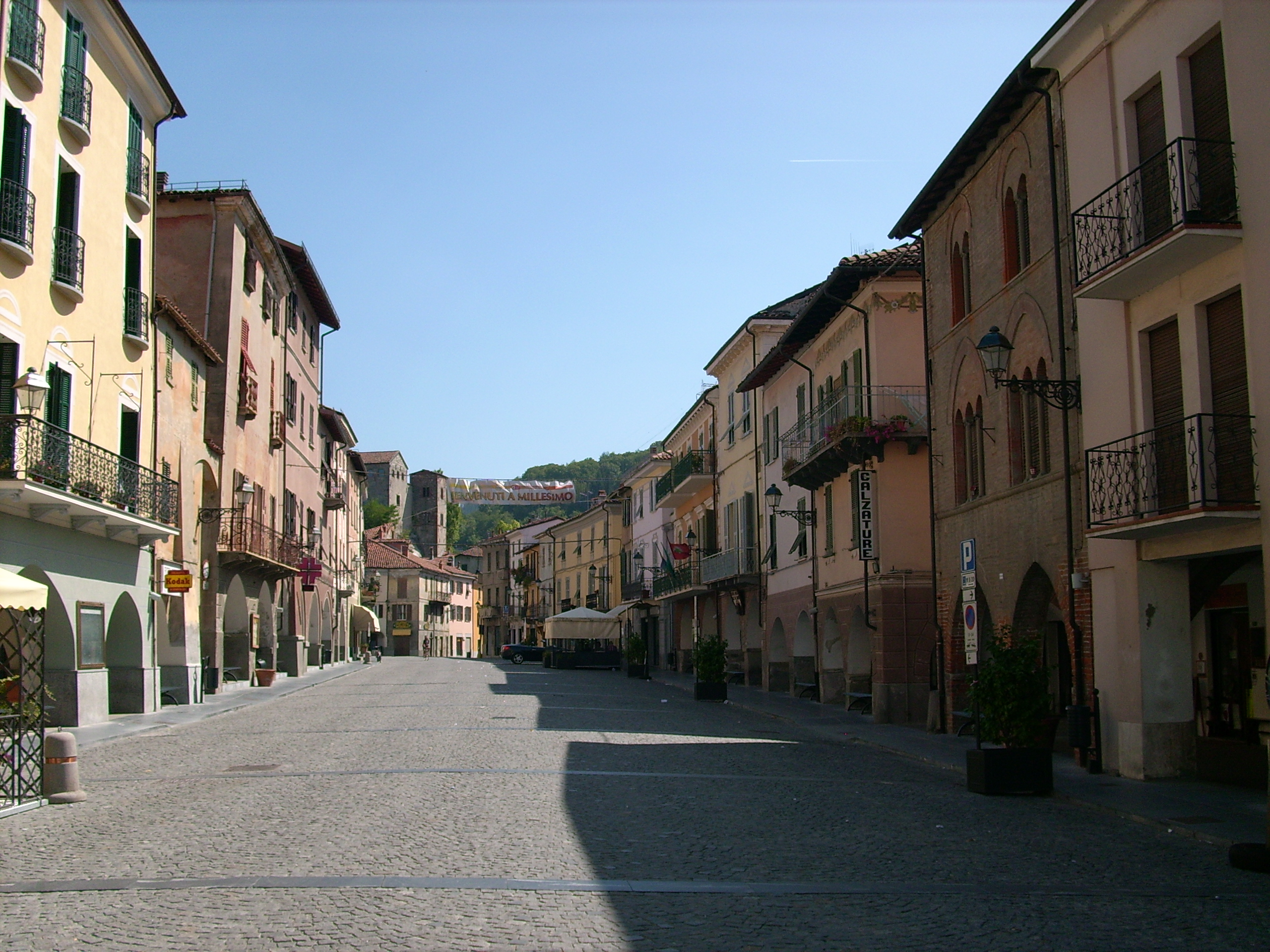 Millesimo, Liguria, Italia